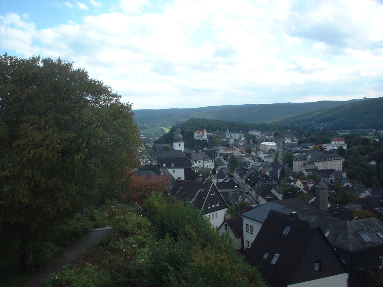 View over Arnsberg